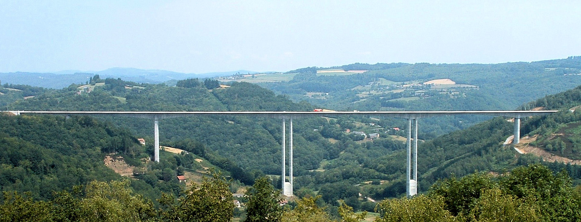 A89 - Viaduc du Pays de Tulle - Ensemble